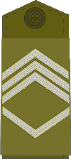 Serbian military ranks and insignia